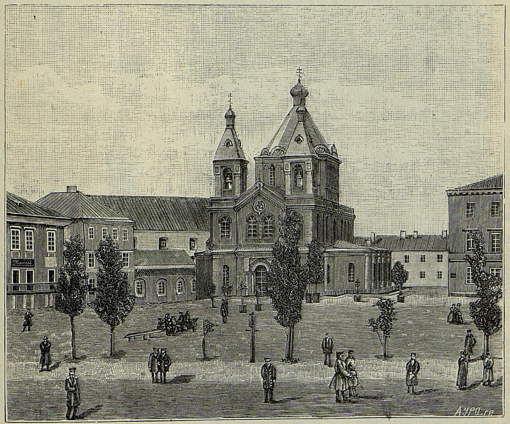 Беларуская (тарашкевіца): Менск (Miensk), рог Высокага Рынку (Vysoki Rynak) і вуліцы Дамініканскай (vulica Daminikanskaja). Царква Сьвятога Духа па першай маскоўскай перабудове